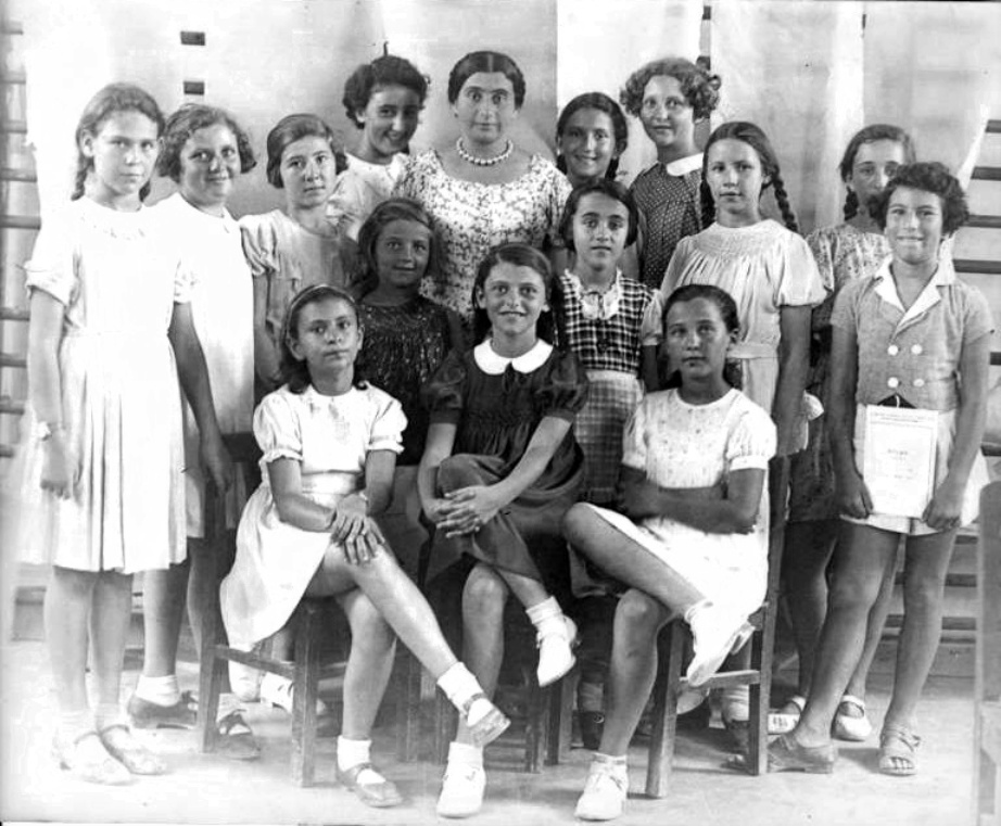 חיה פיקהולץ ותלמידותיה בתל אביב